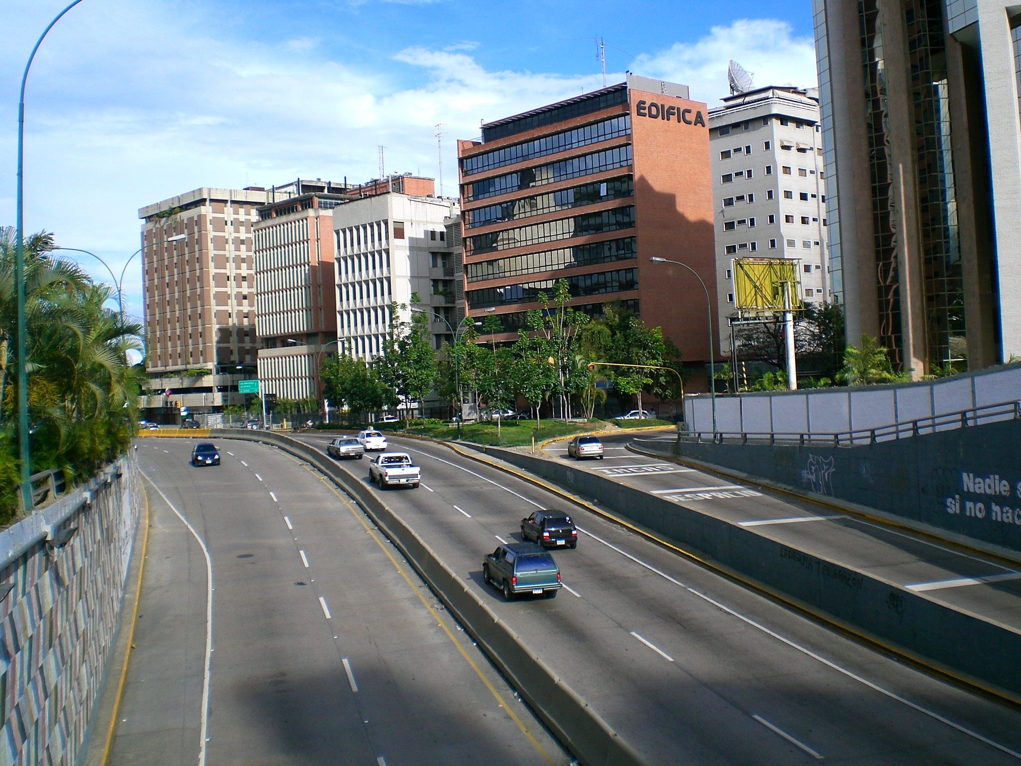 Libertador Avenue, Caracas, Venezuela